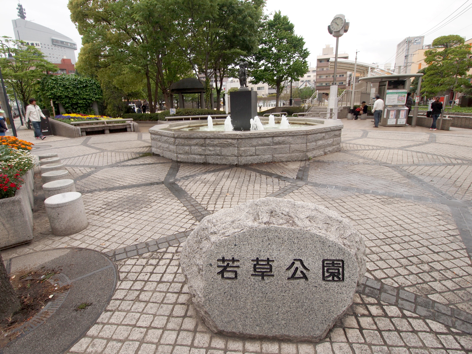 若草公園（大分県大分市）